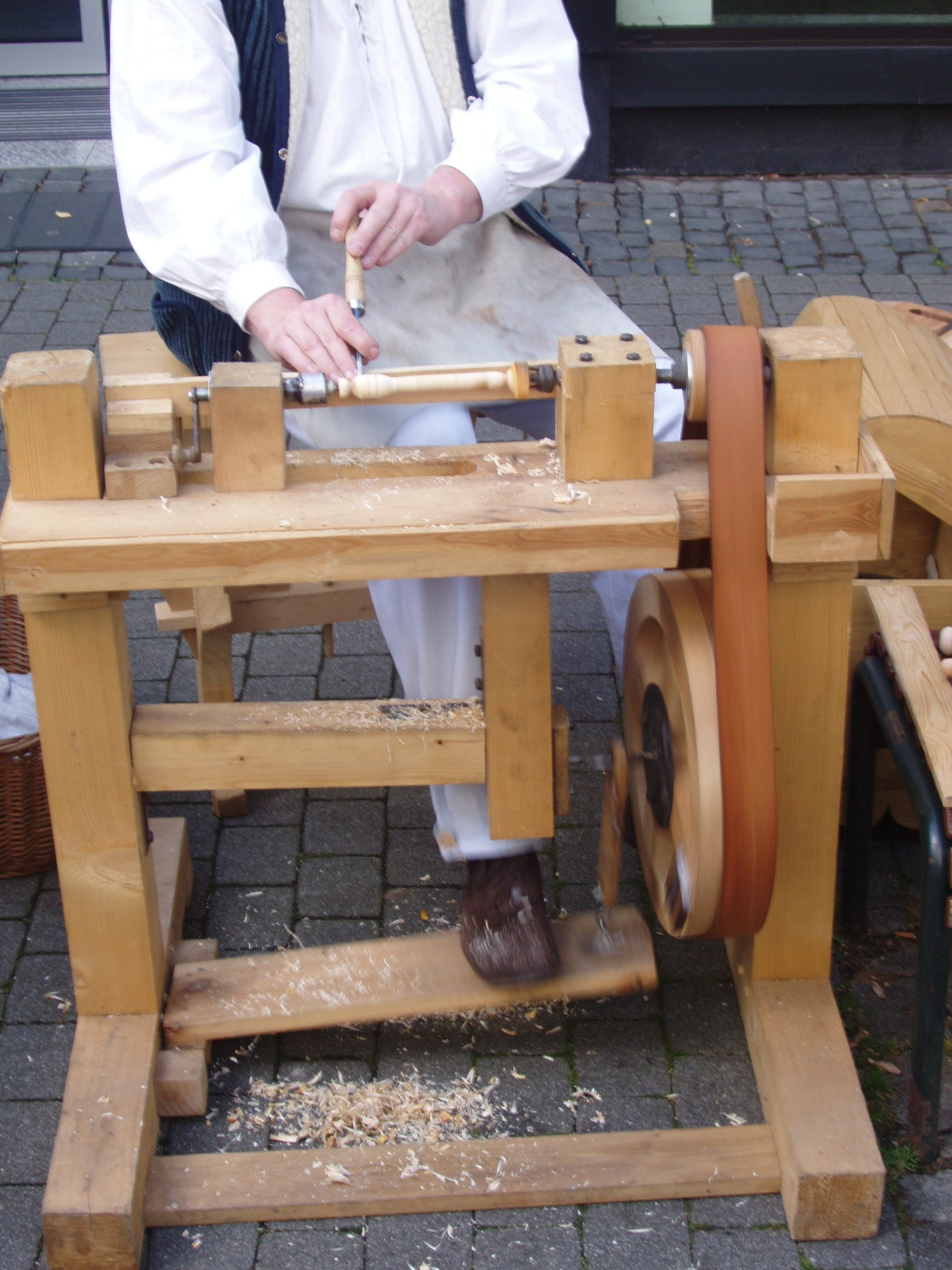 Drehbank